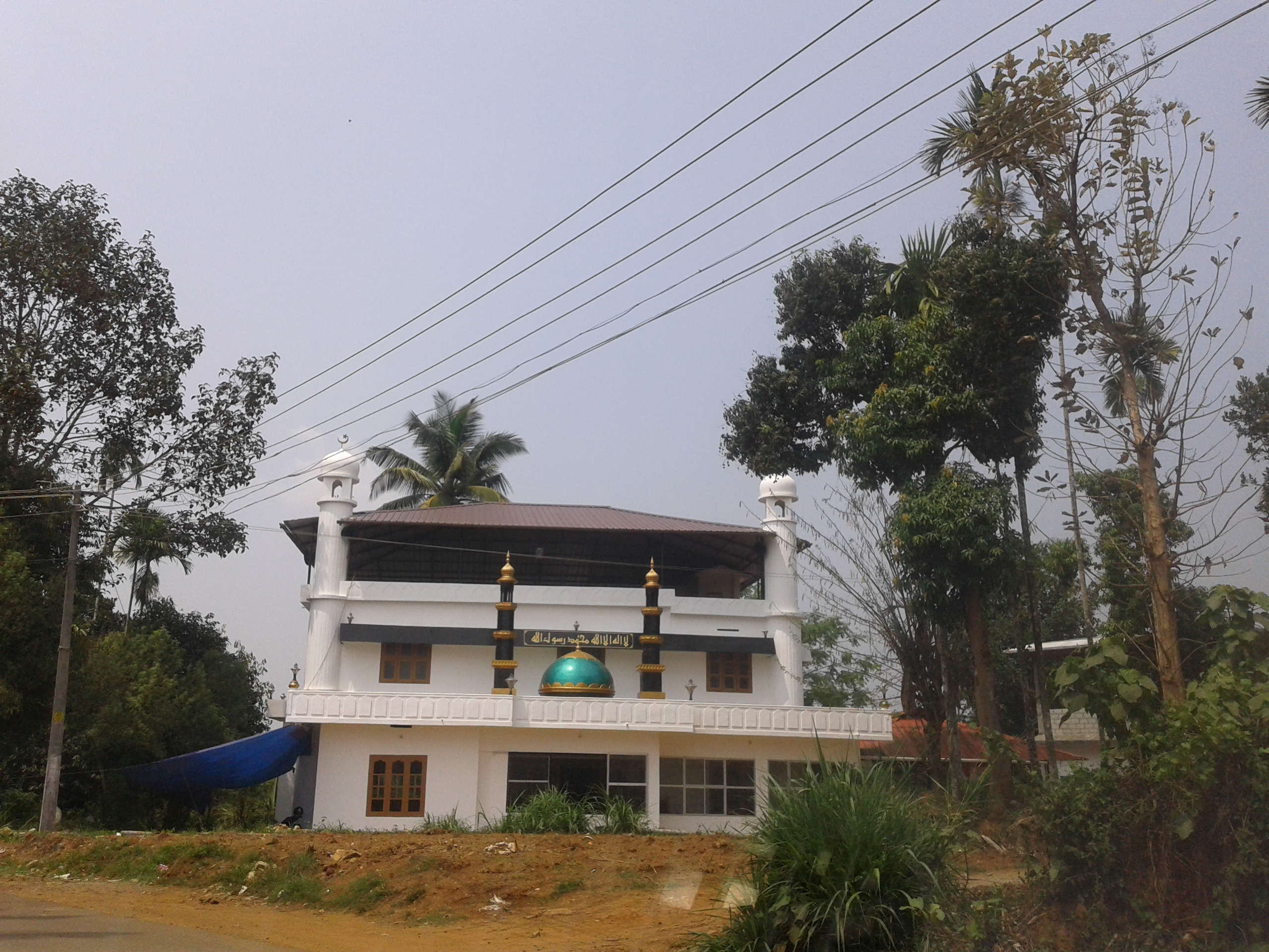 പറളിക്കുന്ന് ജുമാ മസ്ജിദിൻറെ മുൻ ഭാഗം